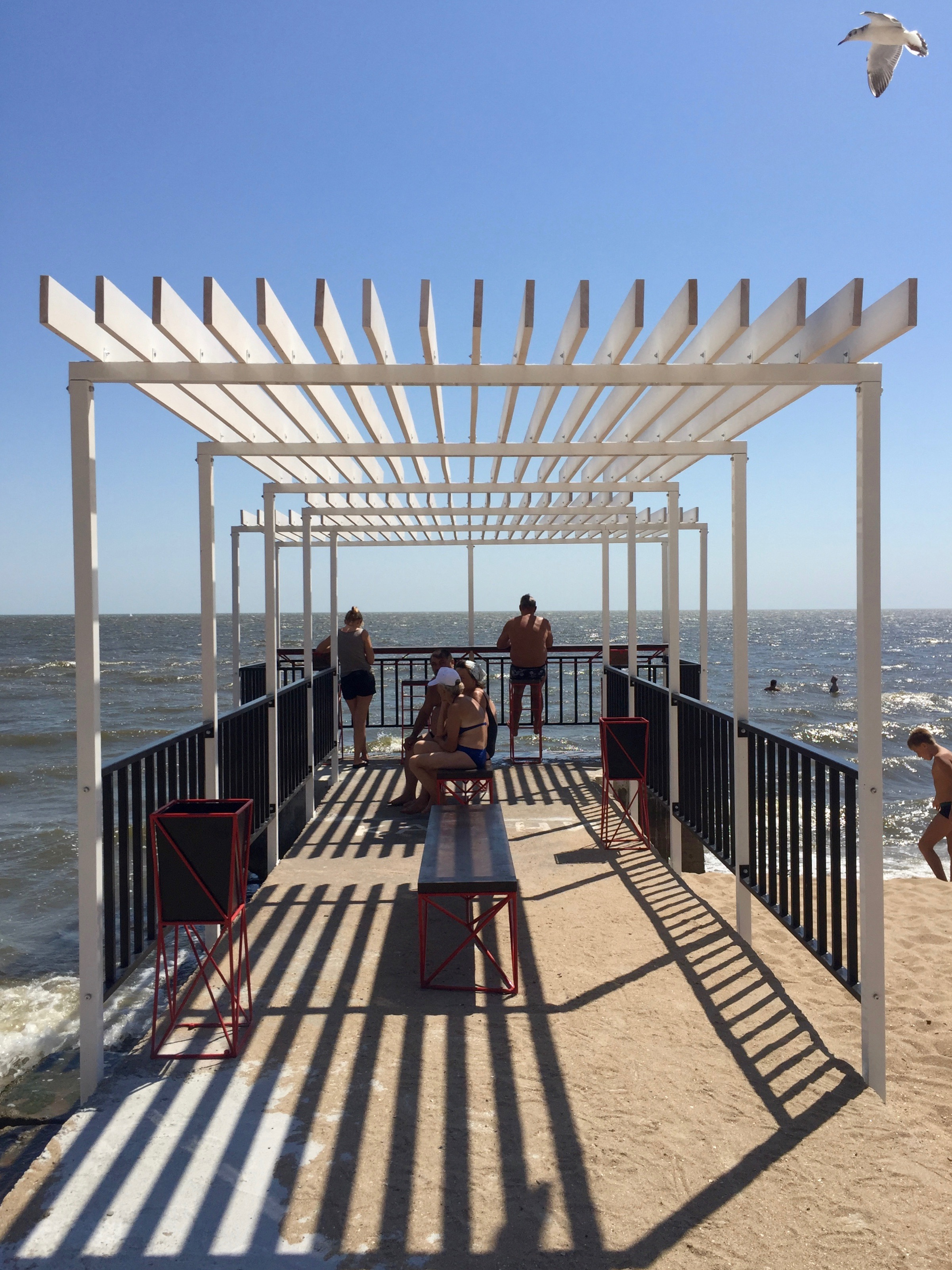 Городской пирс в Мариуполе